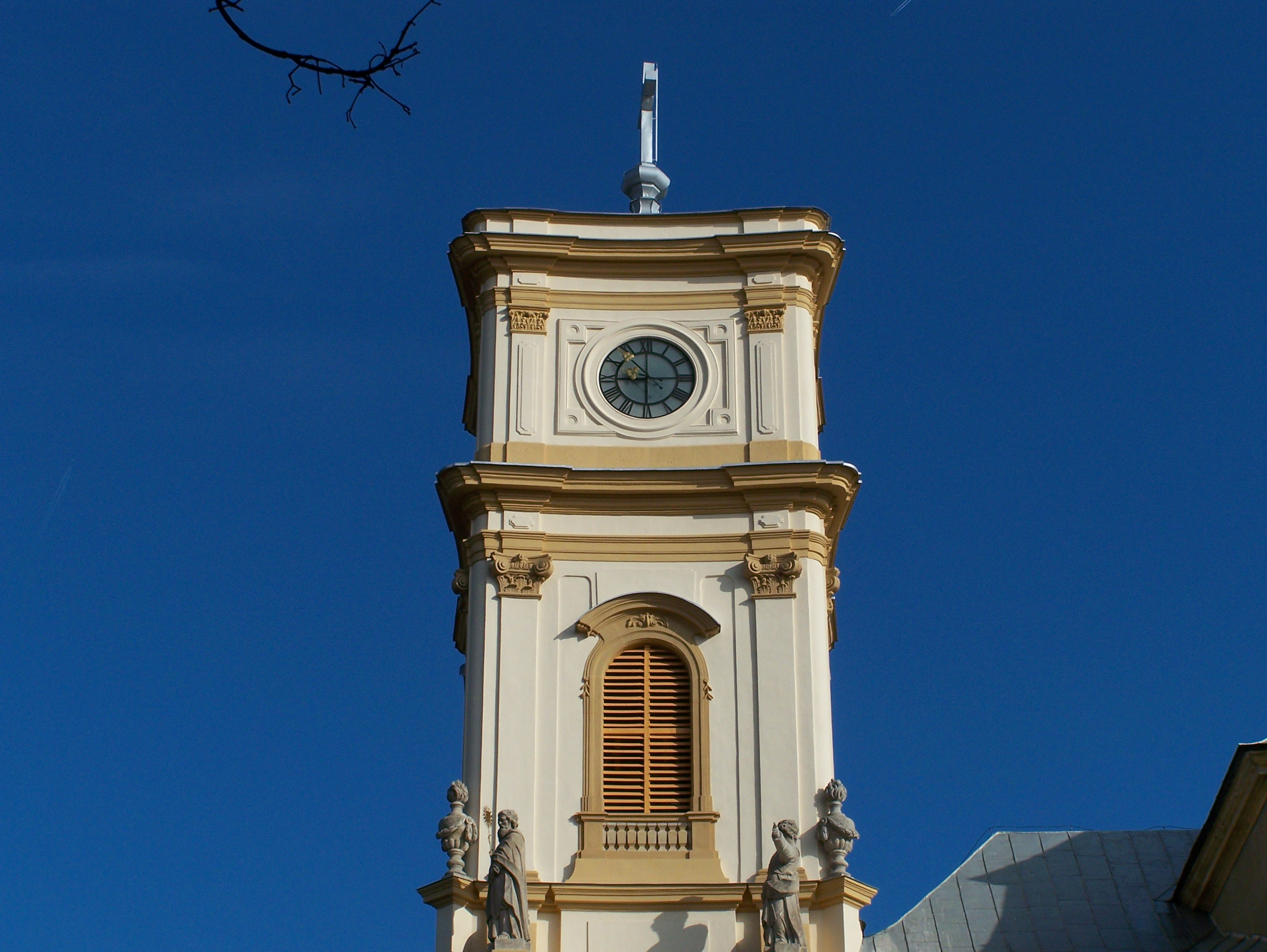 A Nagykárolyi római katolikus templom tornya 01